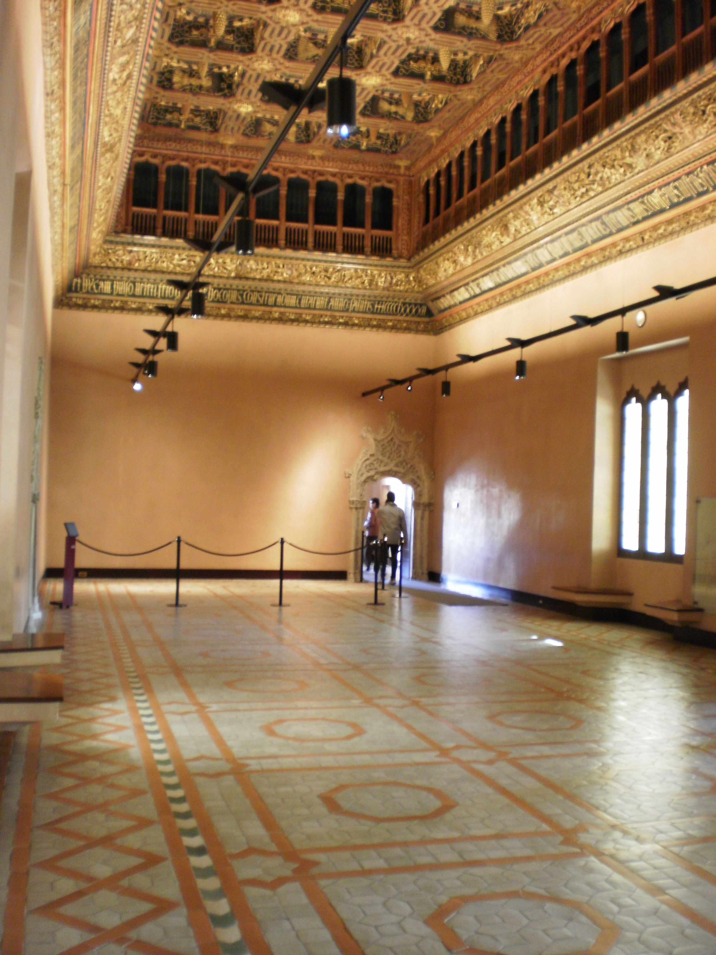 La Aljafería, Zaragoza